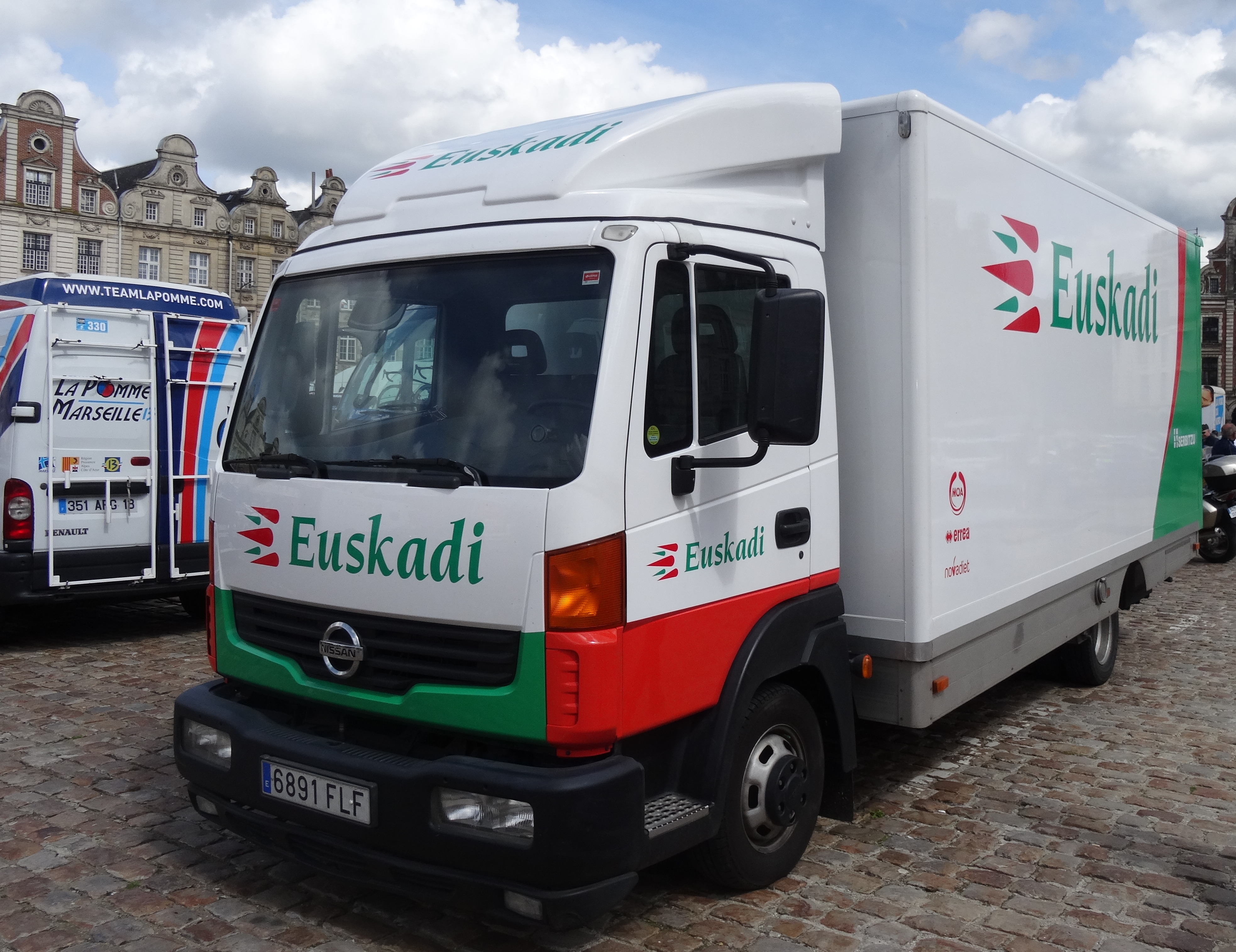 Reportage photographique réalisé le dimanche 25 mai 2014 à l'occasion du départ et de l'arrivée de la troisième étape du Paris-Arras Tour 2014 à Arras, Pas-de-Calais, Nord-Pas-de-Calais, France.